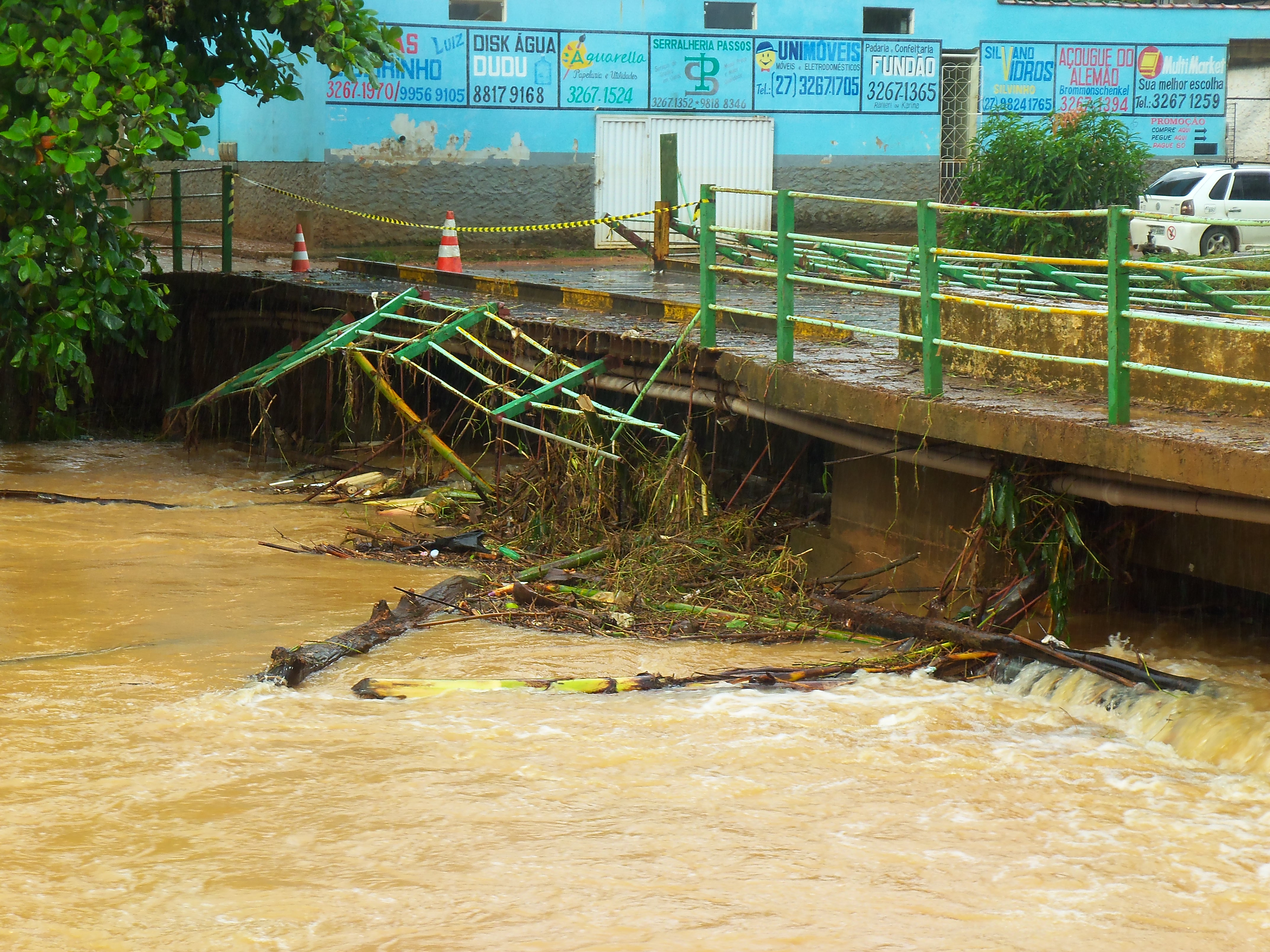 Ponte Luíza Gon Pratti, sobre o rio Fundão, parcialmente destruída, em consequência das fortes chuvas de janeiro de 2012